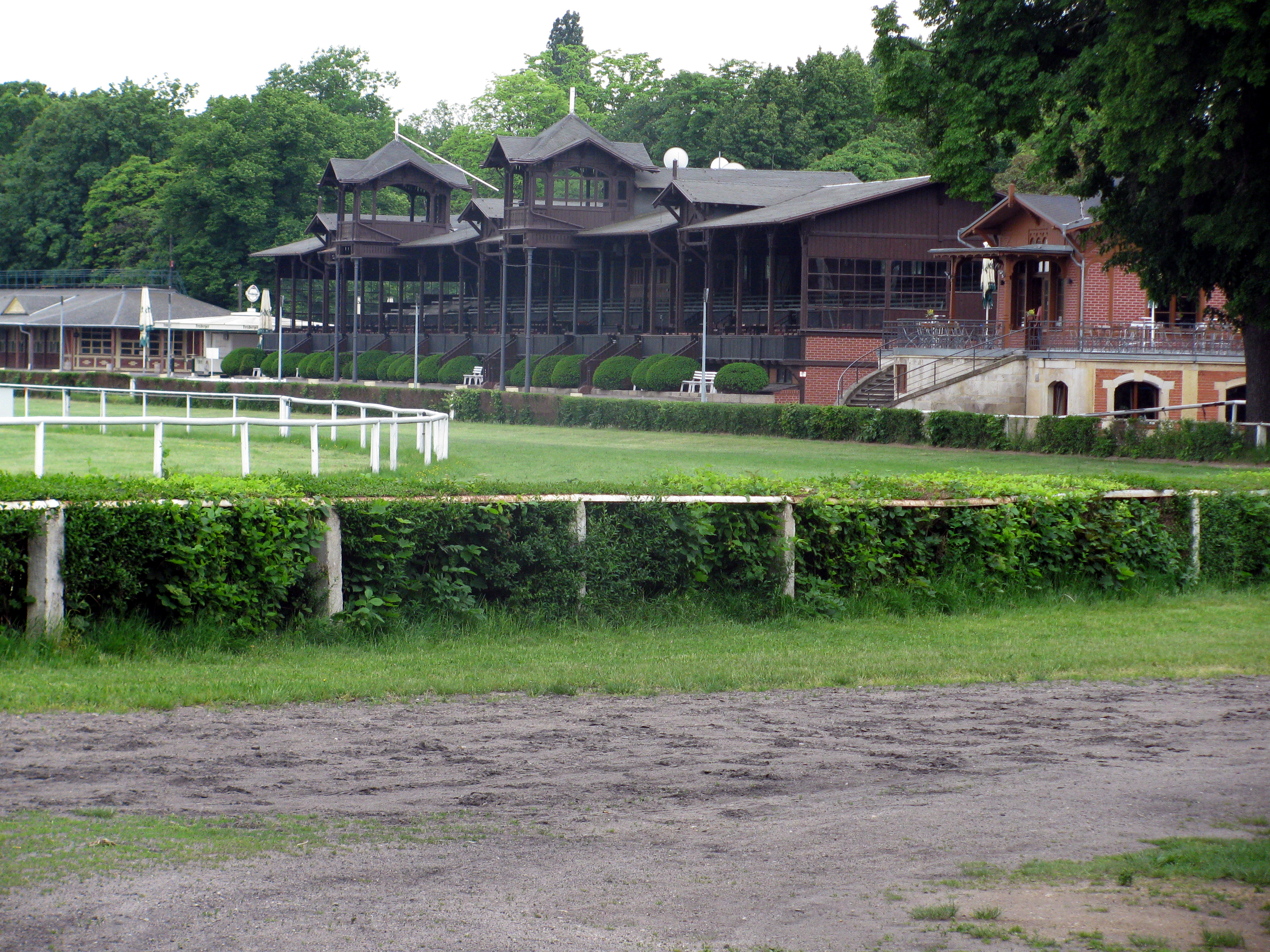 Gebäude an der Pferderennbahn in Seidnitz, Stadtteil von Dresden